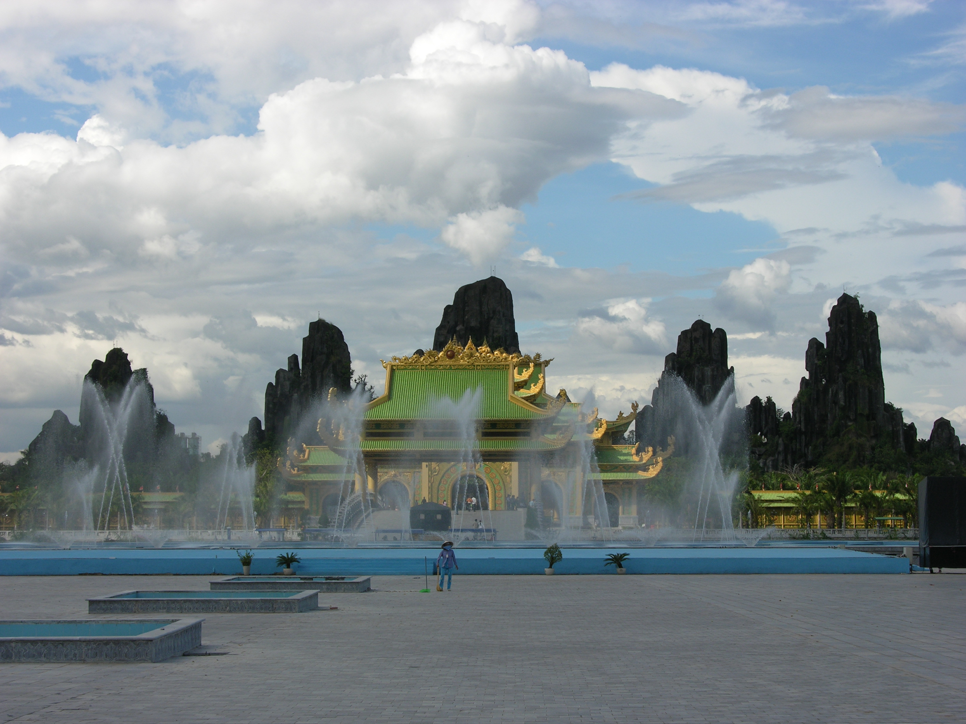 Dãy Bảo Sơn ở Đại Nam Quốc Tự